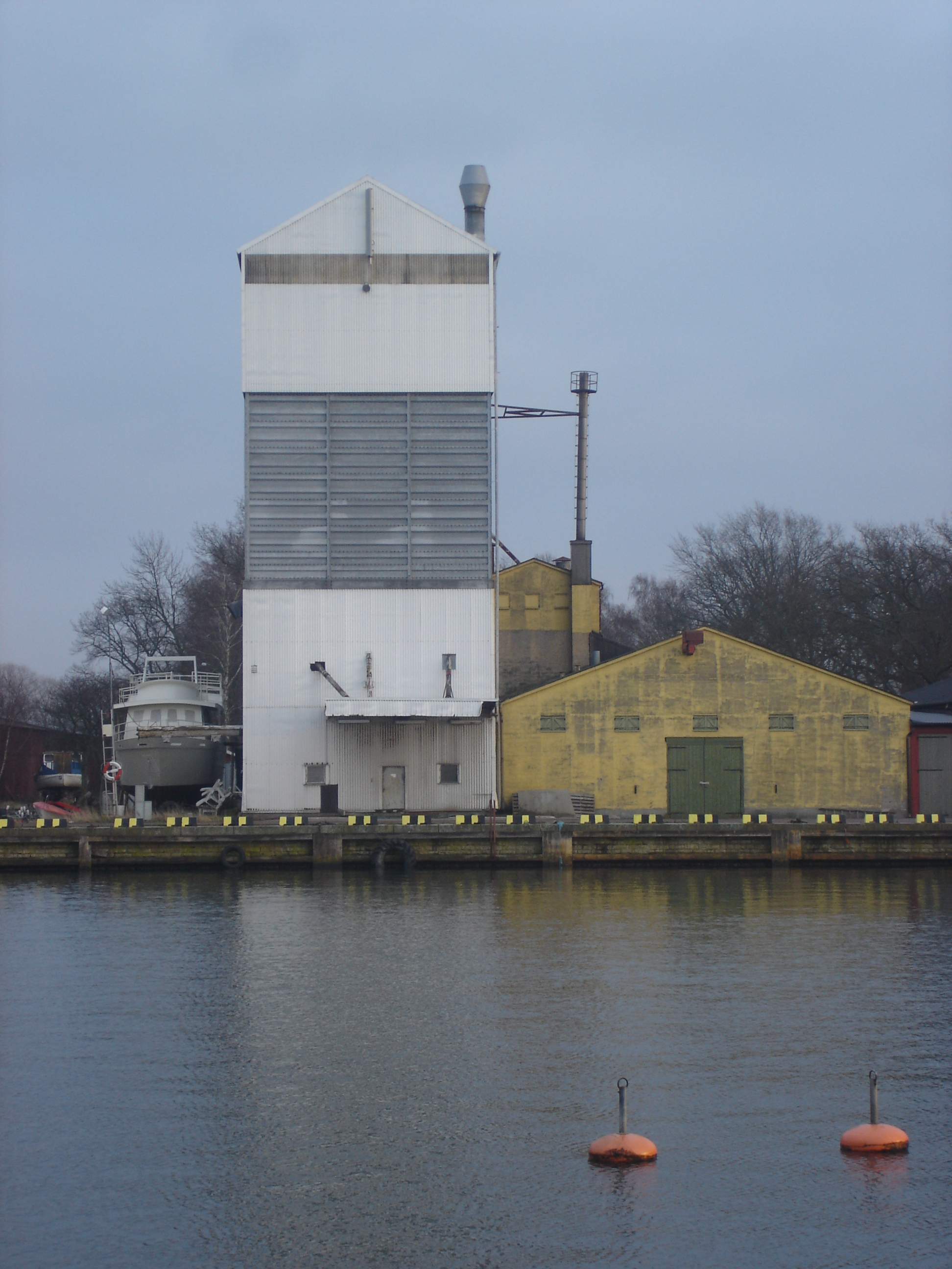 Hamnen i Mörbylånga på Öland